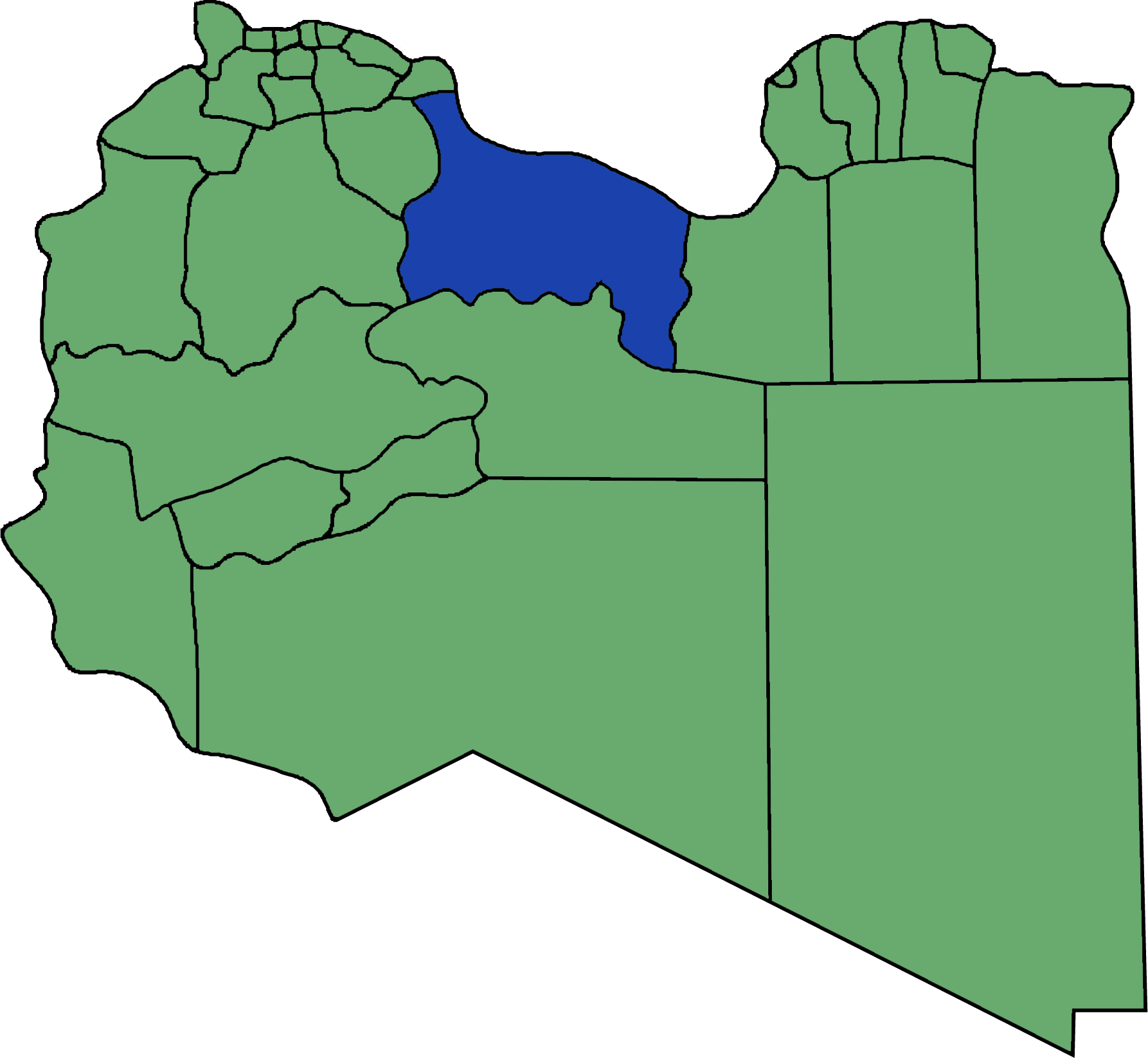 Die neuen Gemeinden (Munizipien) in Libyen. Surt hervorgehoben.